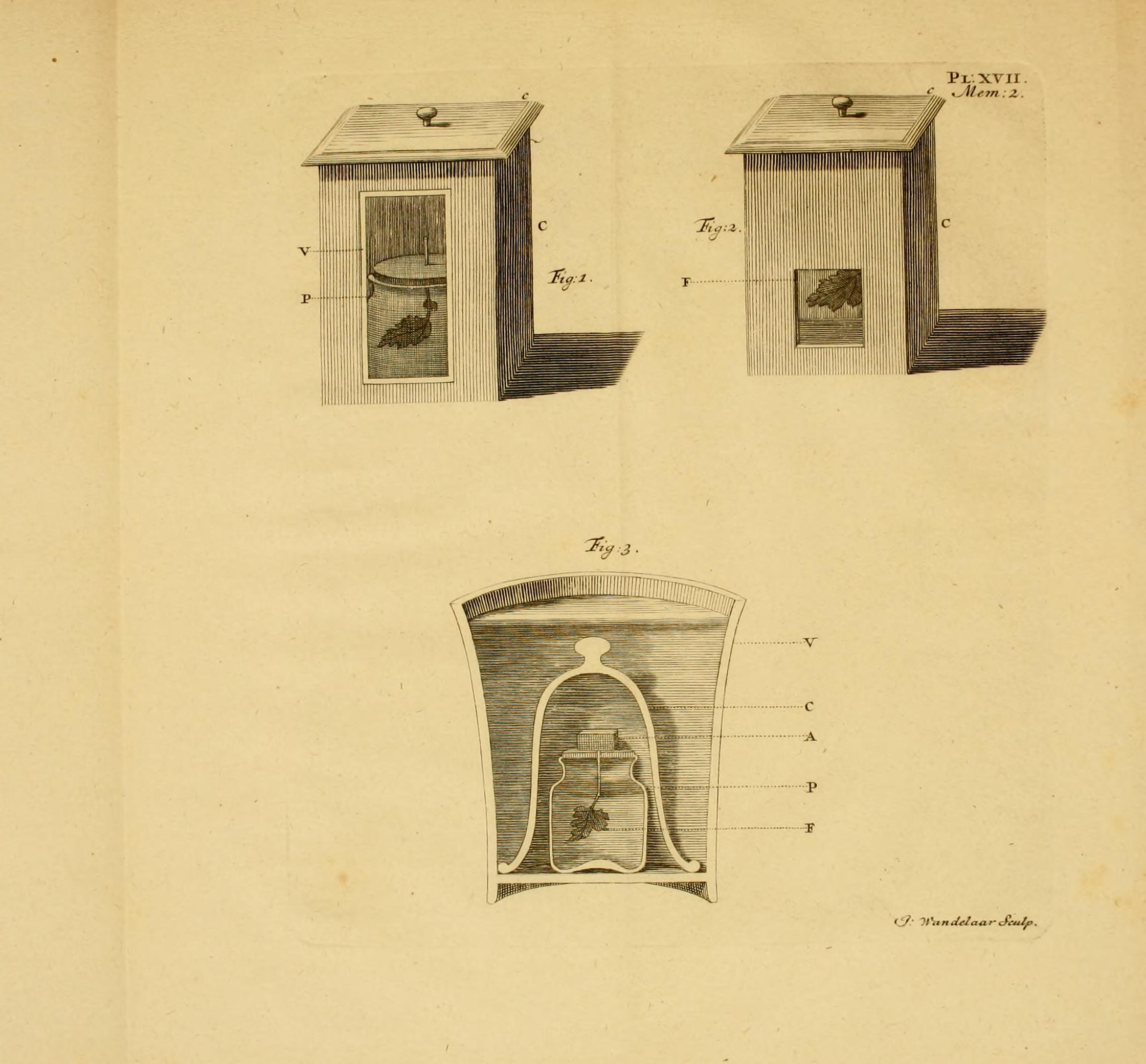 Recherches sur l'usage des feuilles dans les plantes : et sur quelques autres sujets relatifs à l'histoire de la vegetation / par Charles Bonnet...